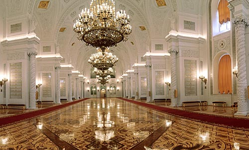 Георгиевский – самый большой и торжественный зал Большого Кремлевского дворца